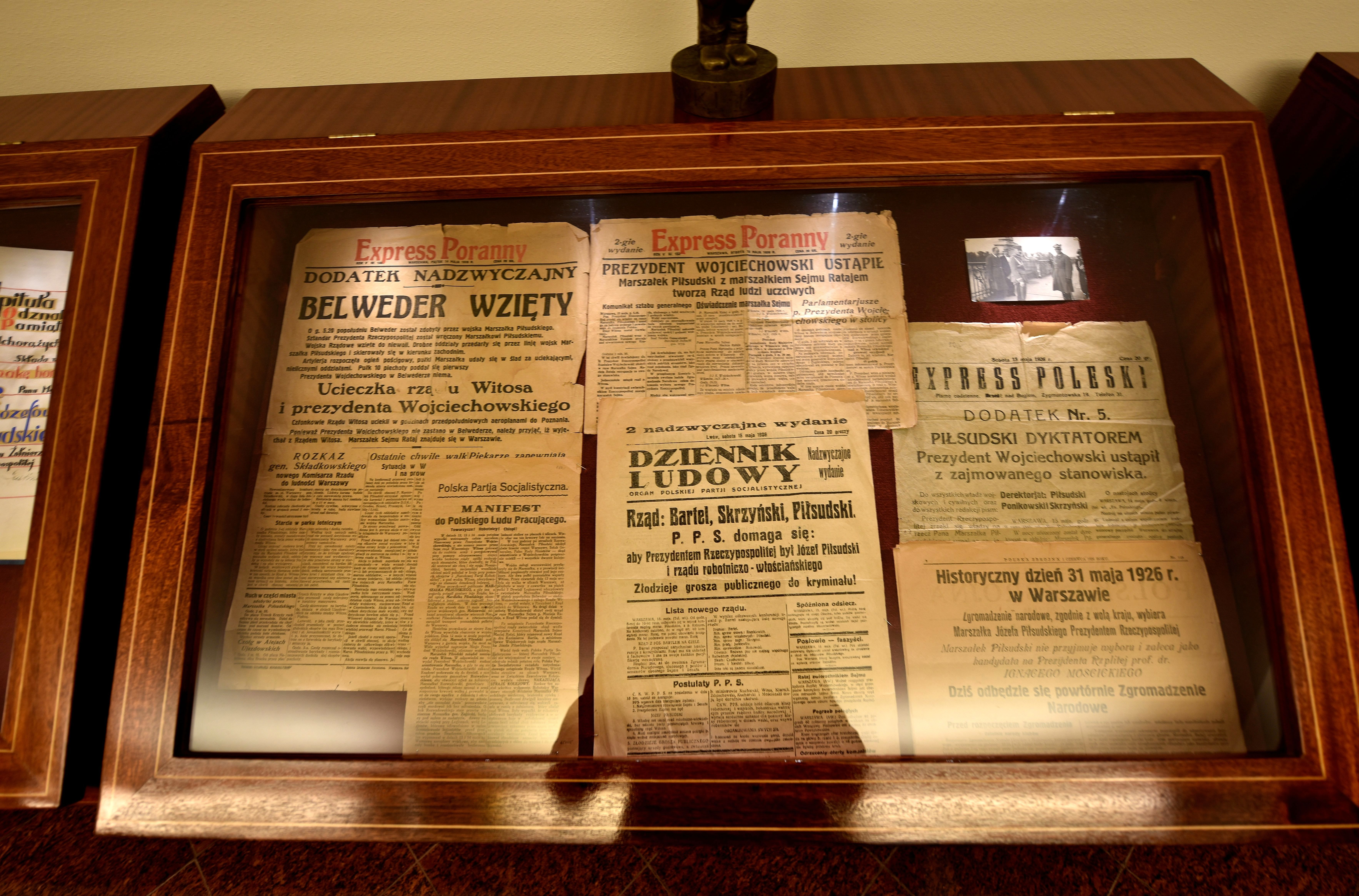 Fragment ekspozycji poświęconej przewrotowi majowemu w Belwederze w Warszawie (Express Poranny, Dziennik Ludowy, Express Poleski).